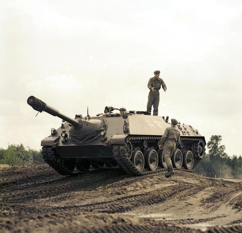 Reportage Bundeswehr Kanonenjagdpanzer, Munsterlager, KTrS III [Munsterlager, Truppenübungsplatz in der Lüneburger Heide]